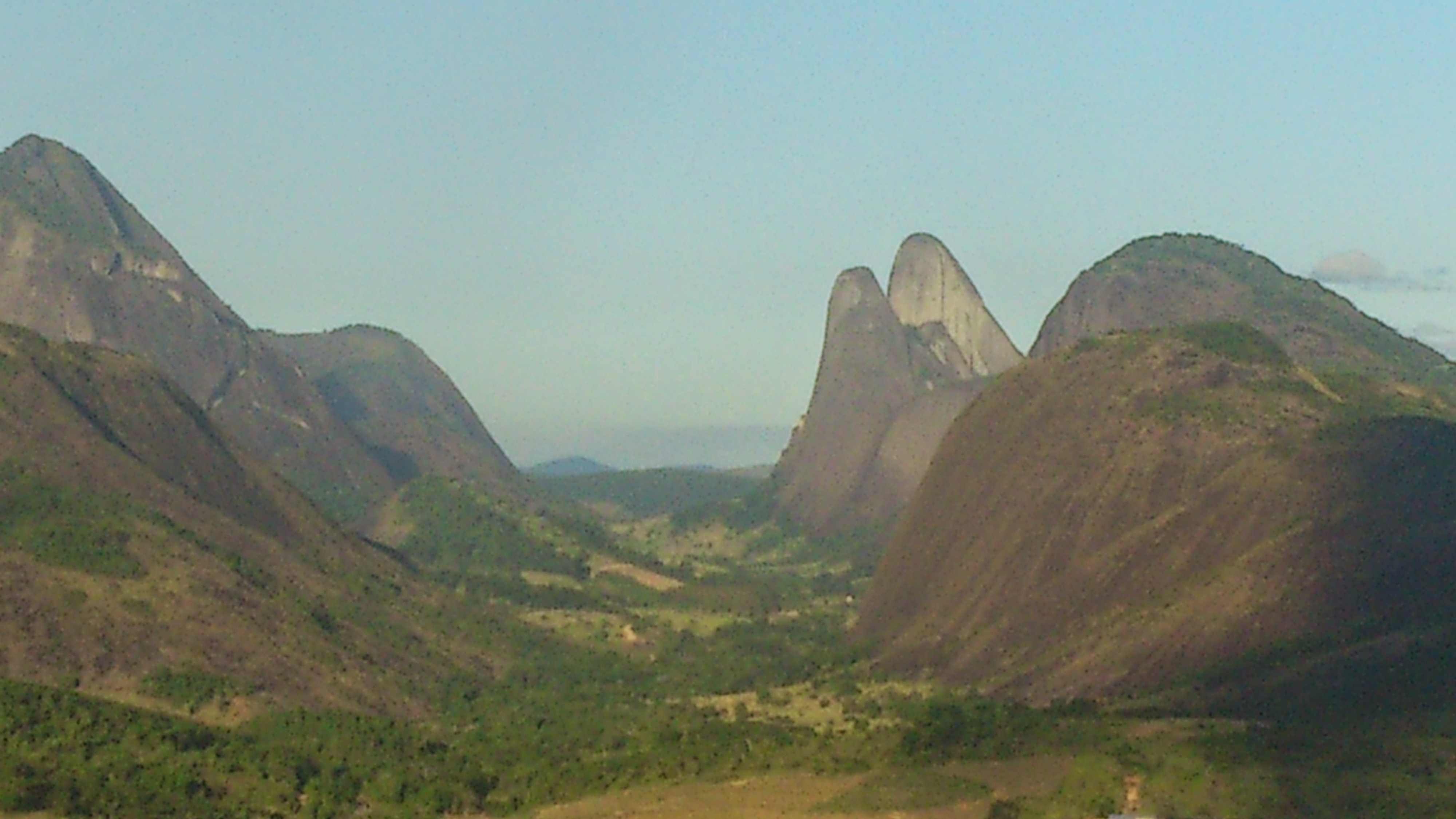 Vista de um dos vales do monumento.